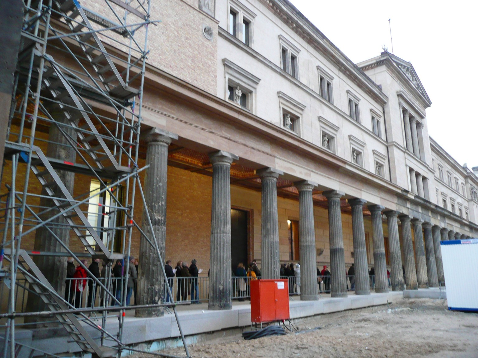 Neues Museum Berlin nach Rekonstruktion im März 2009